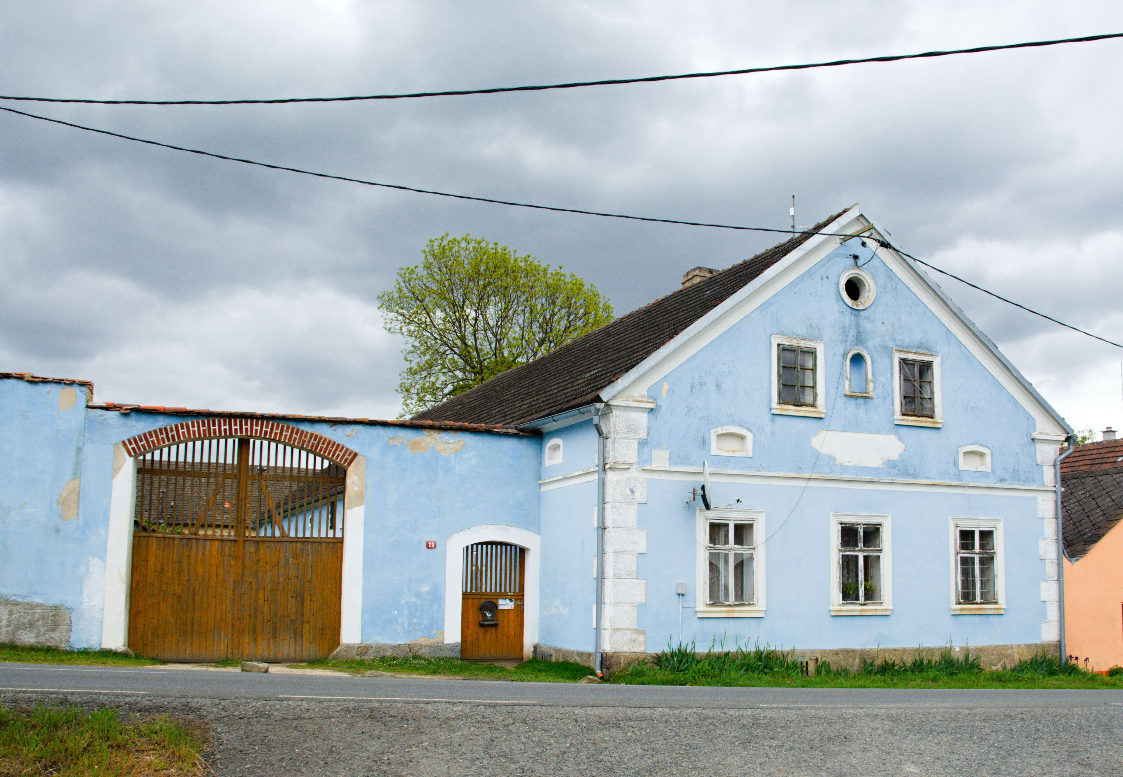 Boječnice - náves